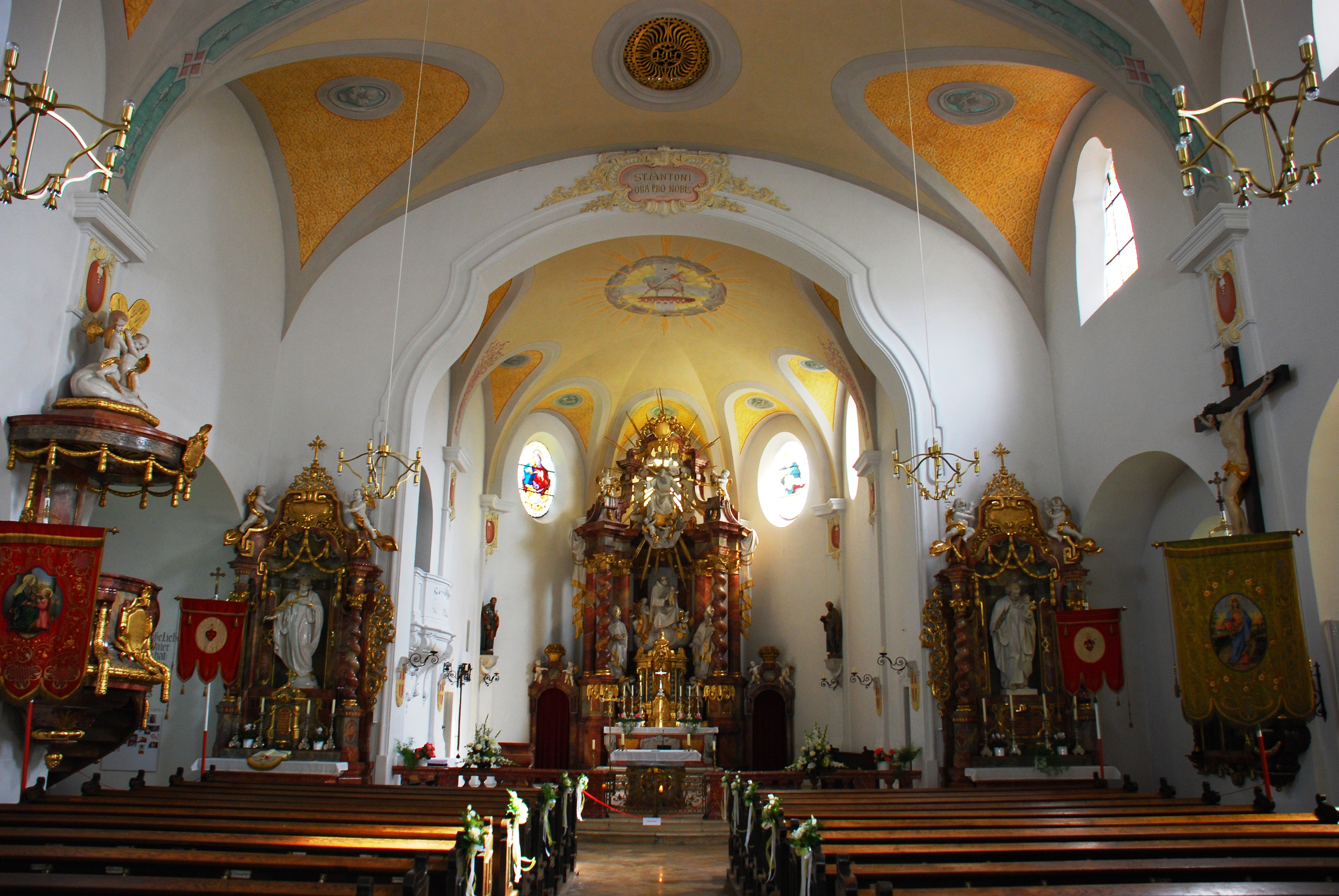 Innenraum der Kirche St. Anton in Hausham, Landkreis Miesbach, Regierungsbezirk Oberbayern, Bayern.